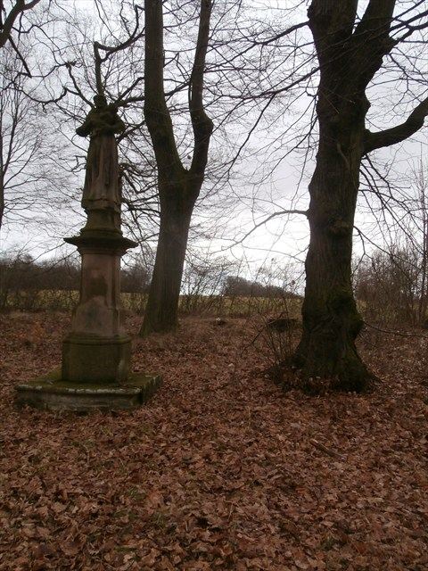 Socha sv. Antonína (Slabce), Z okraj města, Slabce